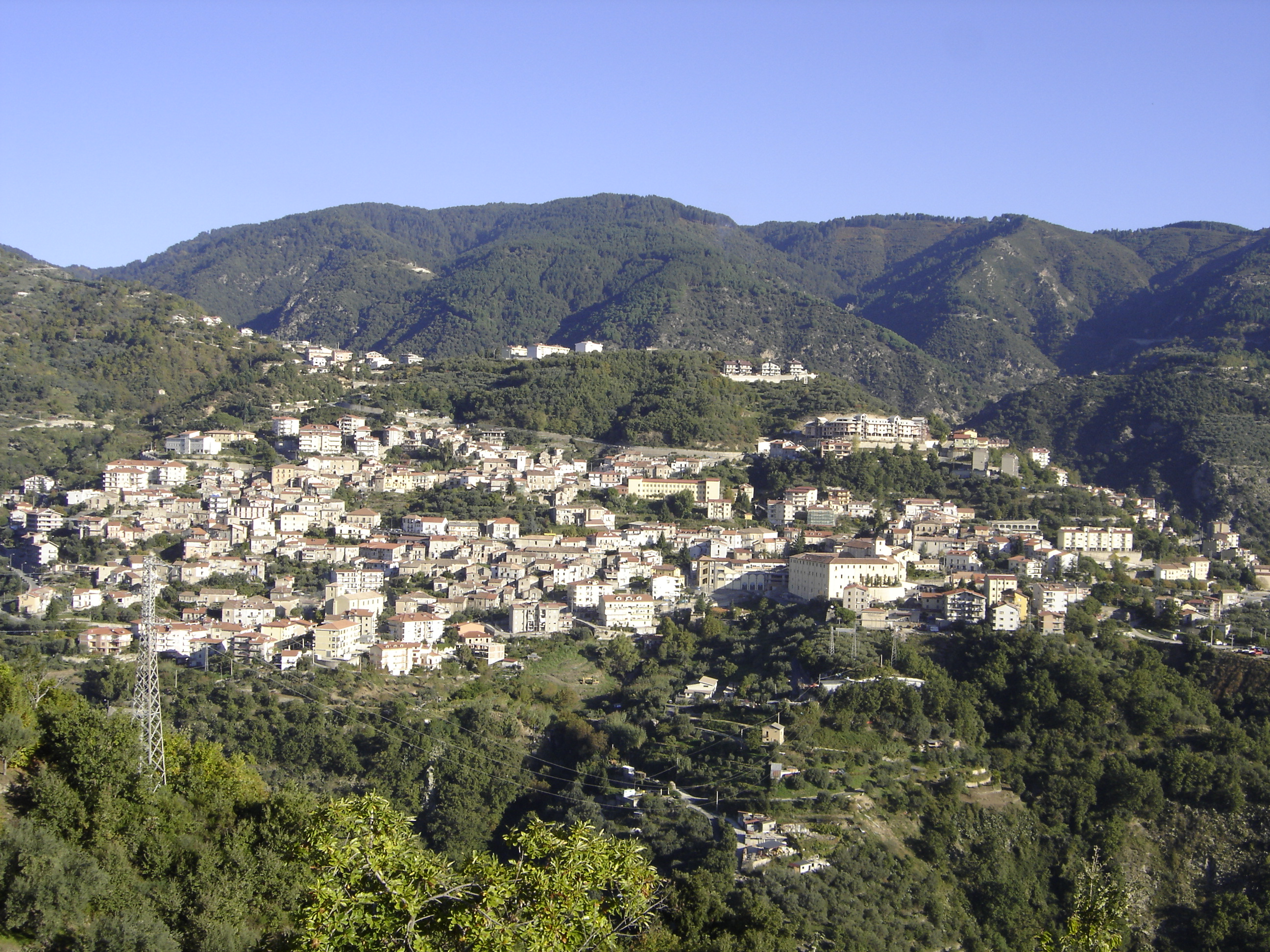 Panorama del comune di Taverna (CZ)